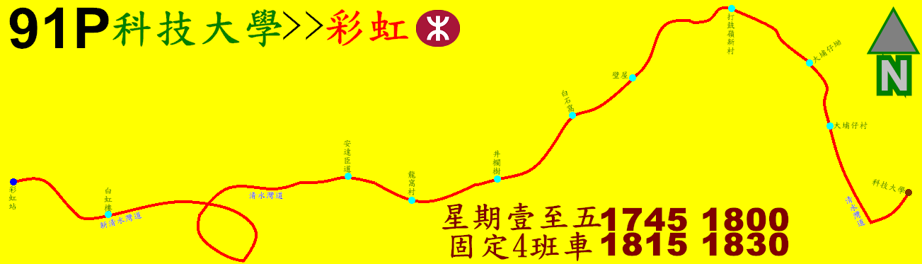 中文（香港）: 九巴91P線(市區方向)的走線圖